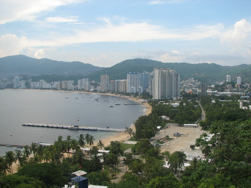 Fotoğraf Yunus Üstünol tarafından çekilmiştir. The photograph were taken by Yunus Üstünol.